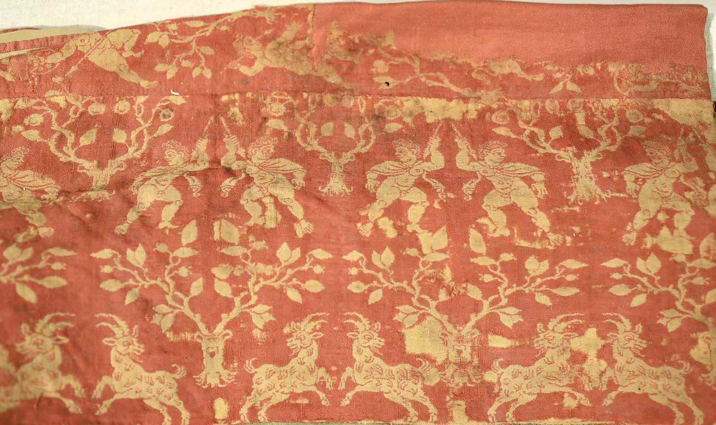 2019年10月31日新京报的报道，在北京大学赛克勒考古与艺术博物馆展出的、新疆出土的东汉晚期红地对人兽树纹罽袍。新京报记者浦峰拍摄。